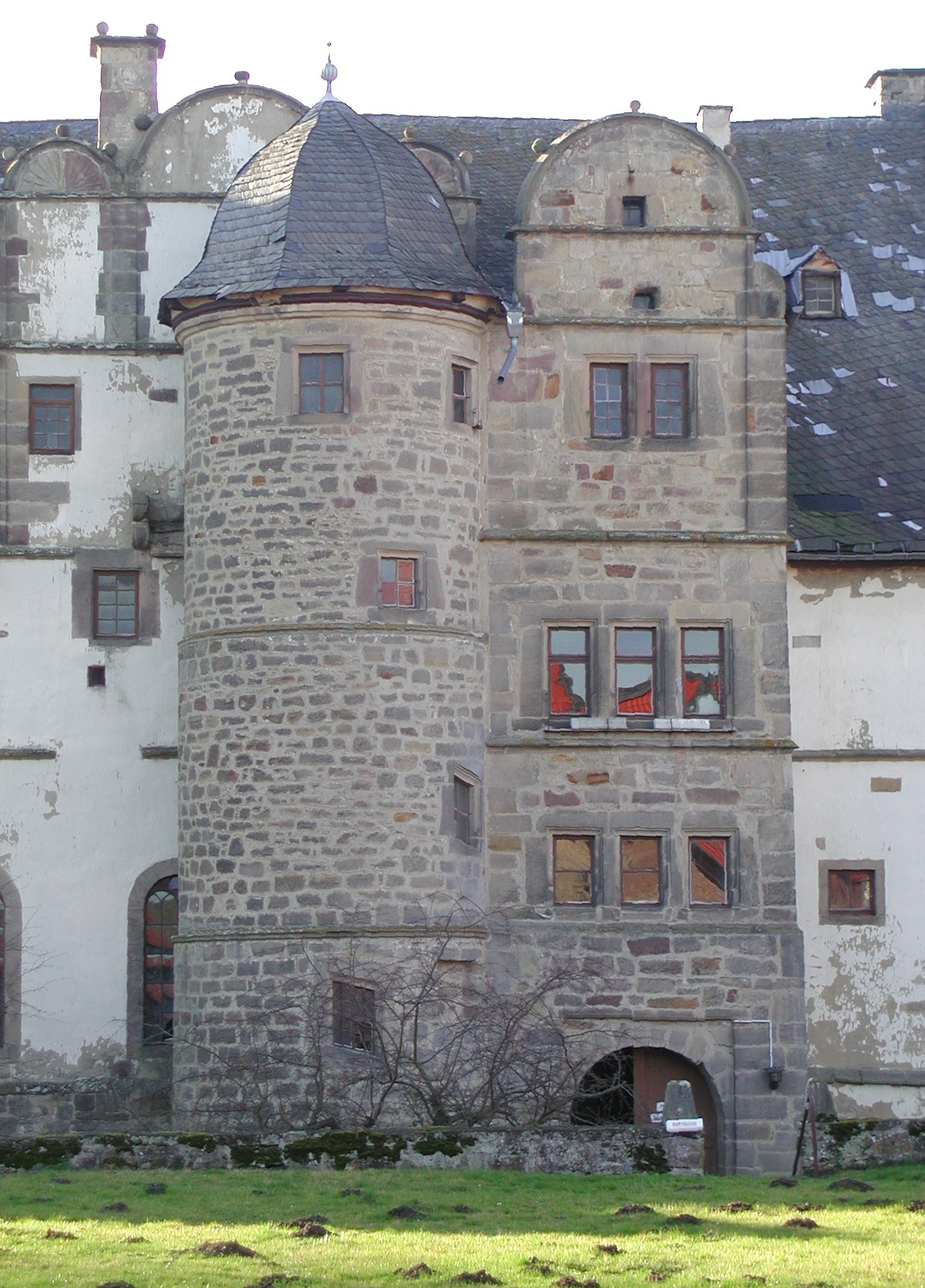 Weserrenaissance-Wasserschloss Elmarshausen bei Wolfhagen (Hessen): Nordostecke mit Tor und Treppenturm